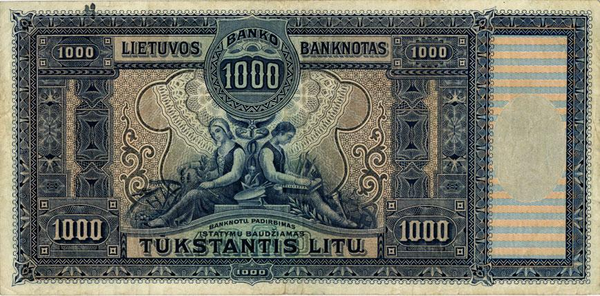 Lithuania 1000 litas 1924